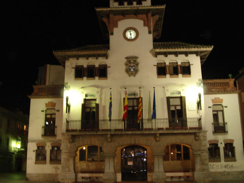 Ajuntament de Sant Celoni FOTO ZztopzZ